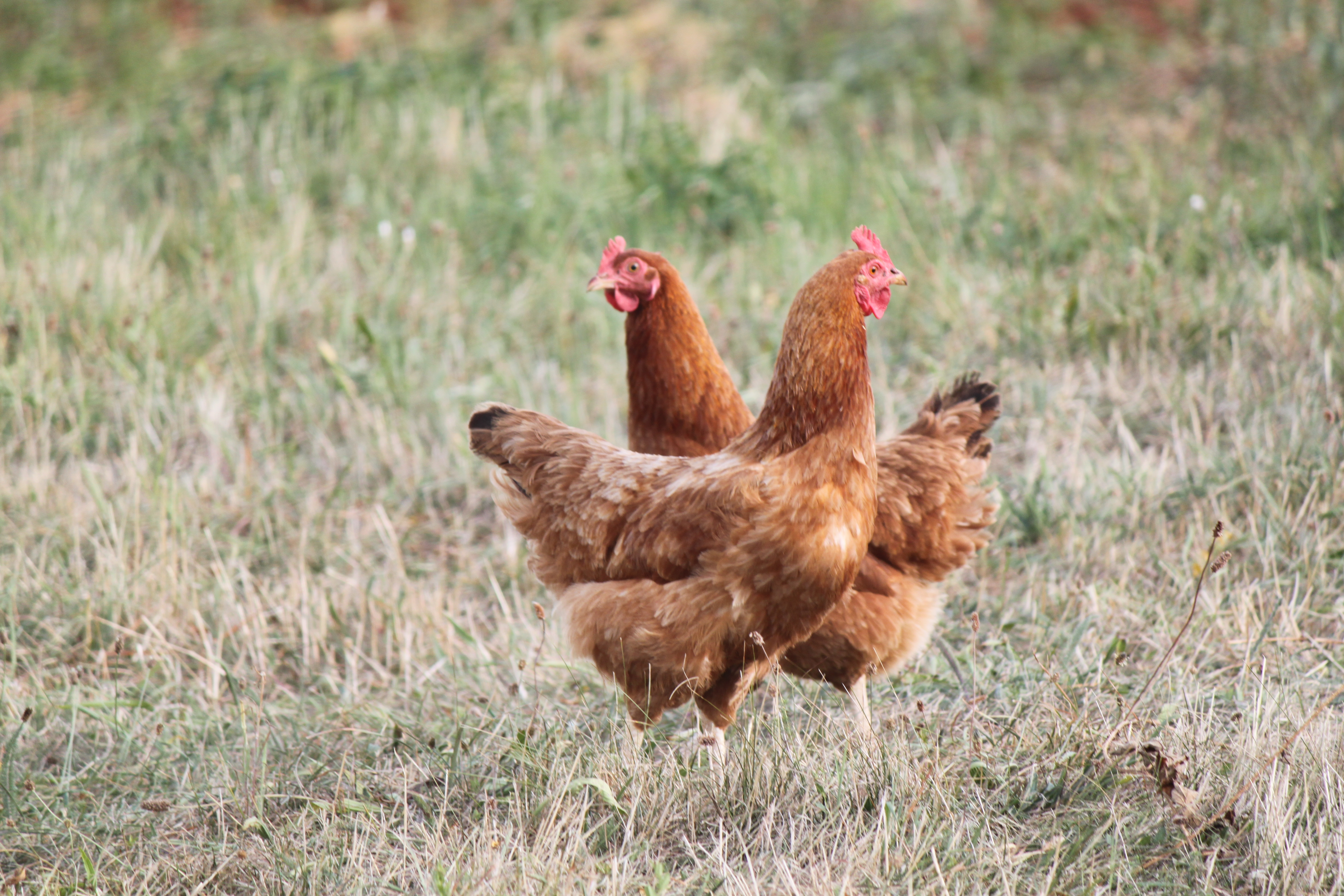 Poulets de la Drôme